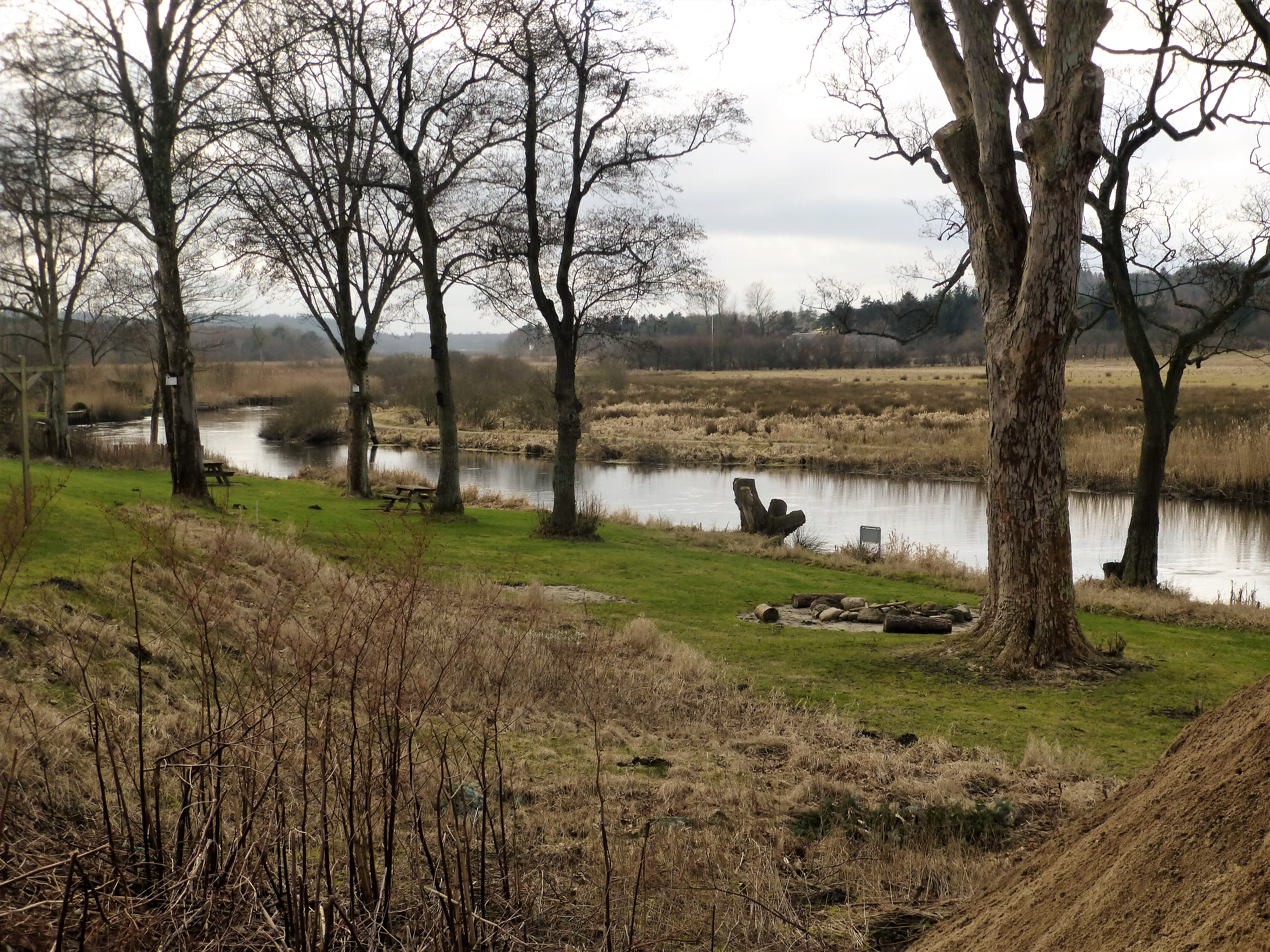 Gudenå set mod syd, ved Resenbro